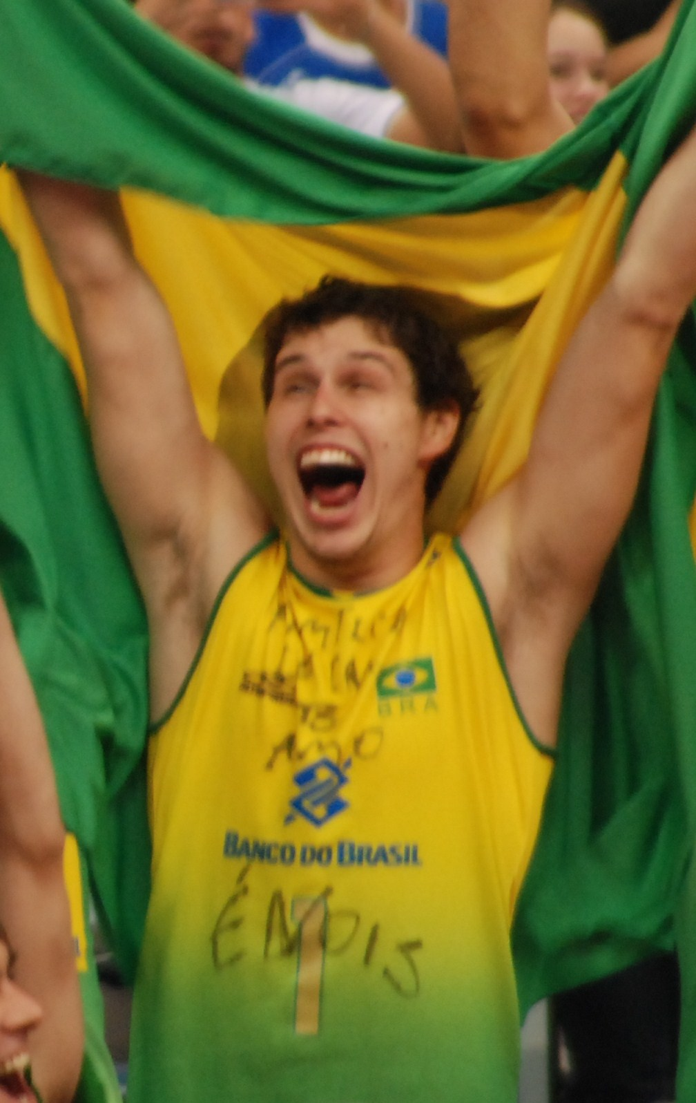 Brazilian volleyball player Bruno Rezende